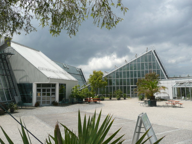 Ökologisch-Botanischer Garten der Universität Bayreuth Haupteingang zum Ökologisch-Botanischen Garten Bayreuth